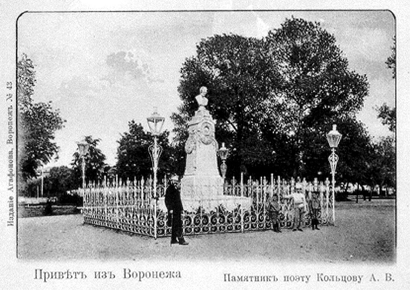 Памятник Кольцову